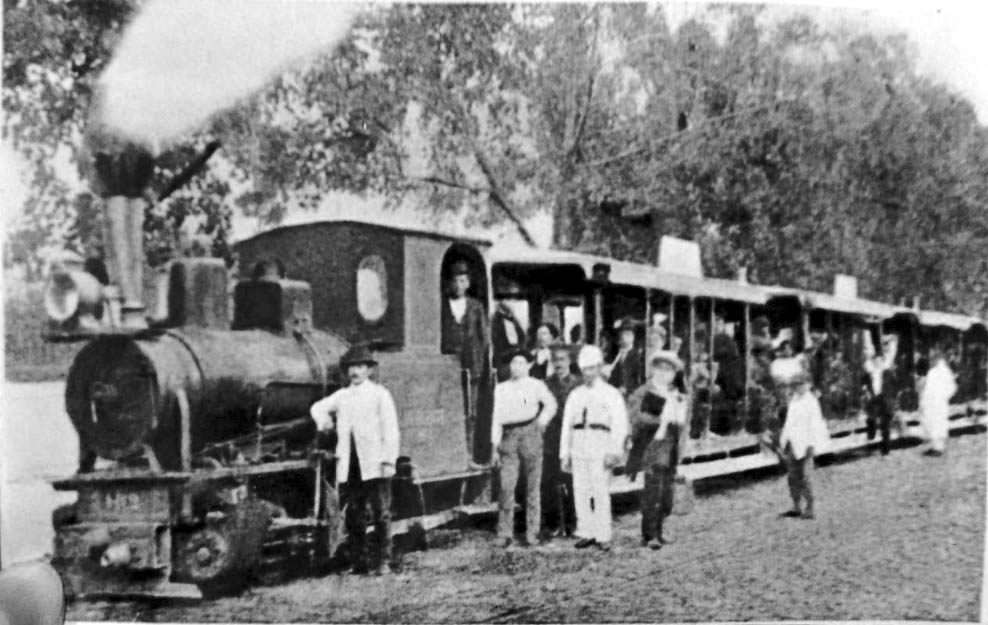 Municipio de Yerba Buena - El tranvía rural en 1916